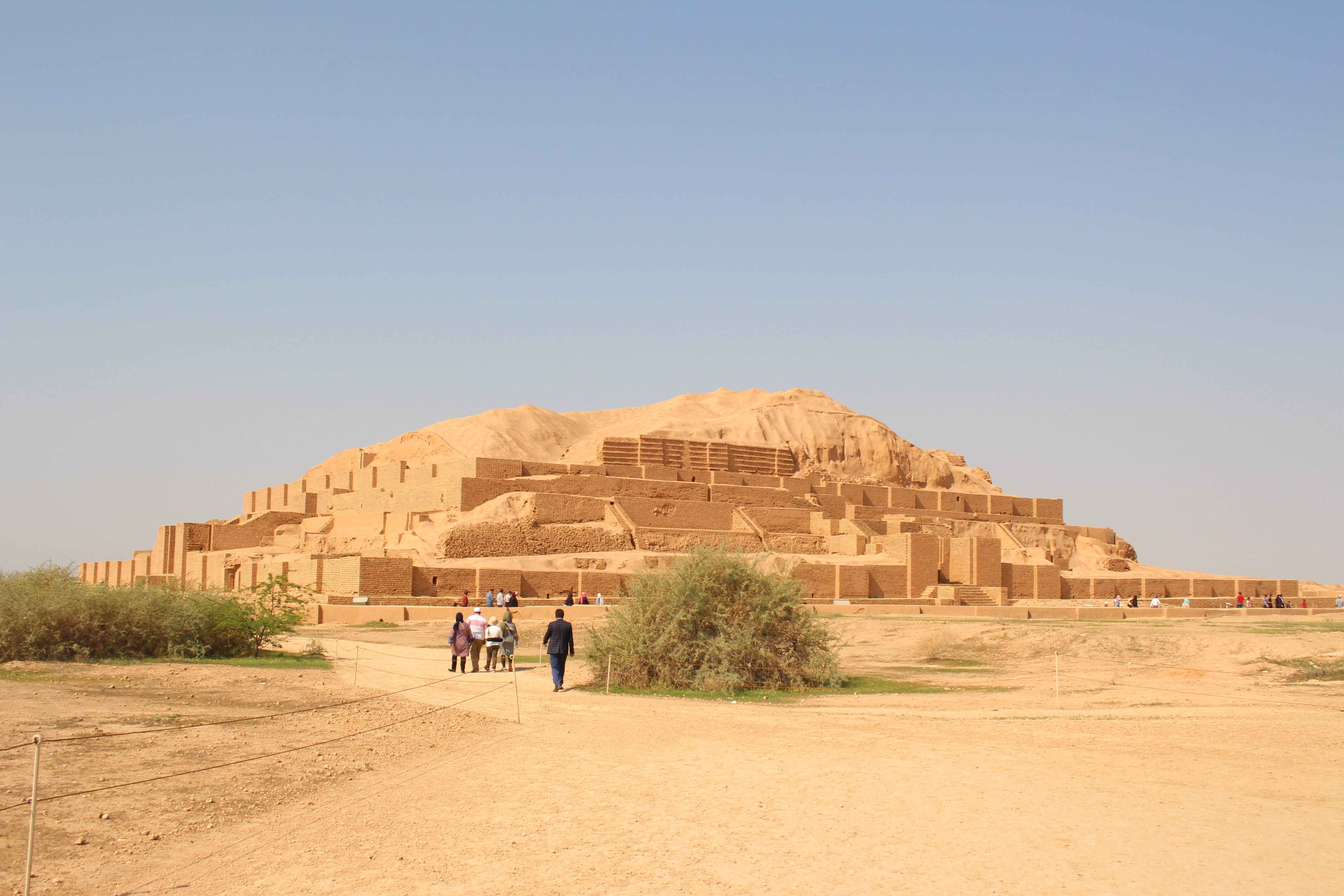 معبد چغا زنبیل/ زیگورات چغا زنبیل